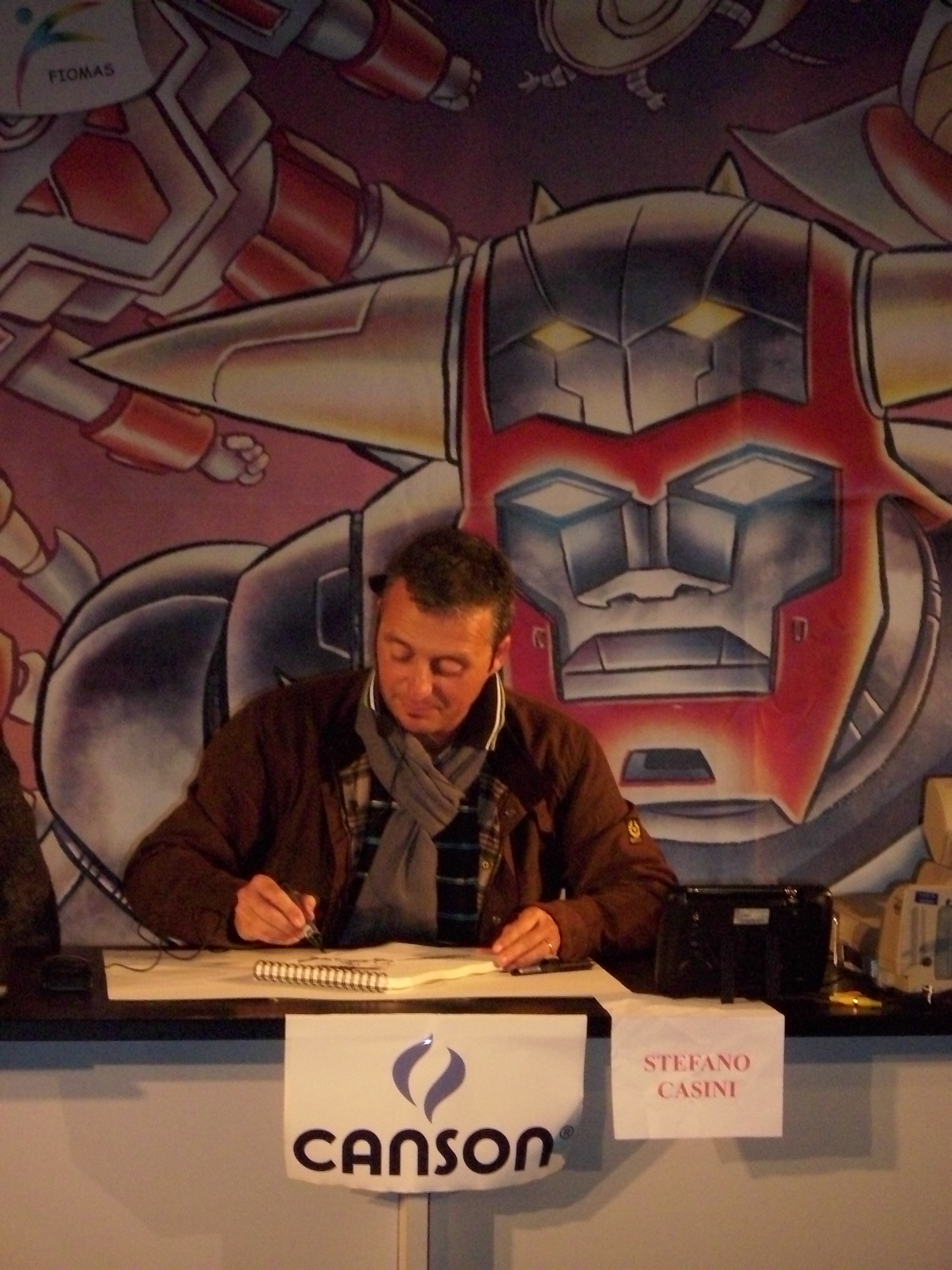 Il disegnatore Stefano Casini a Lucca Comics&Games 2008